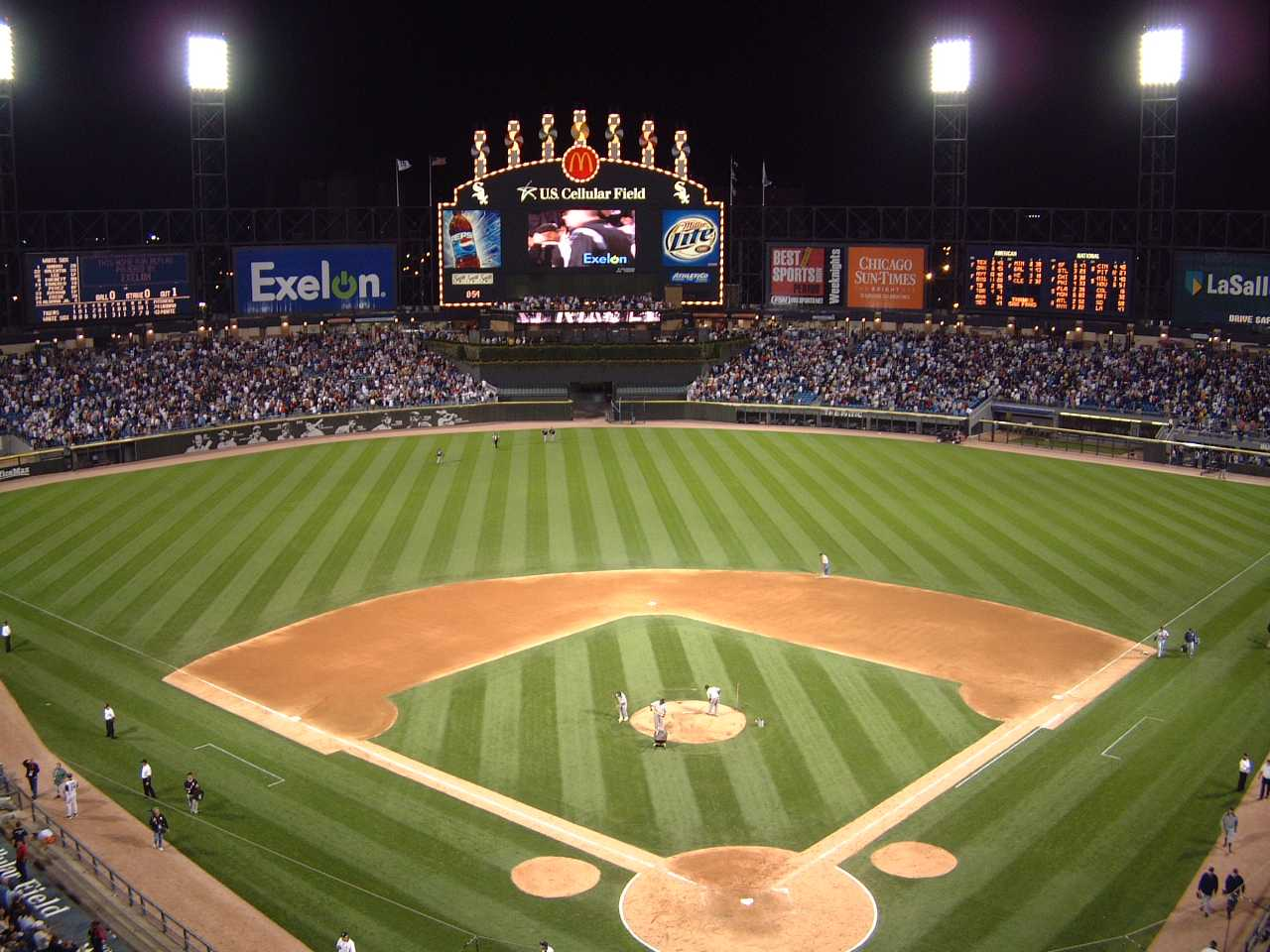 U.S.Cellular Field